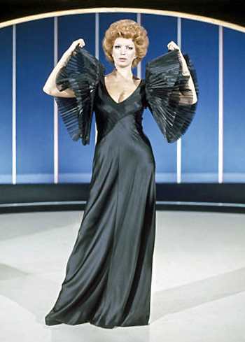 Iva Zanicchi al programma televisivo Totanbot nel 1975.